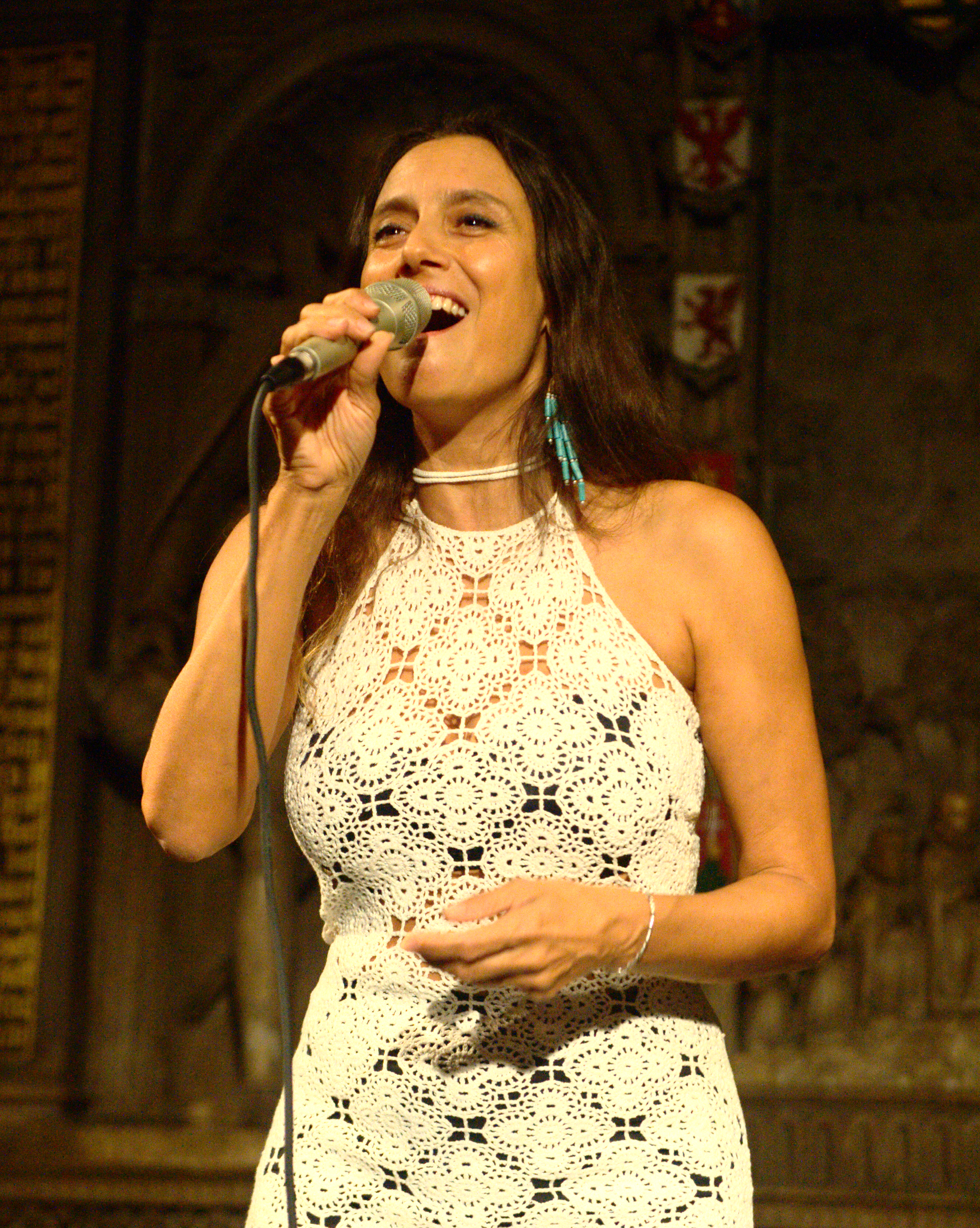 Melanie Bong bei einem Konzert des Lulo Reinhardt Latin Swing Project in der Stadtkirche Darmstadt am 1. Oktober 2017